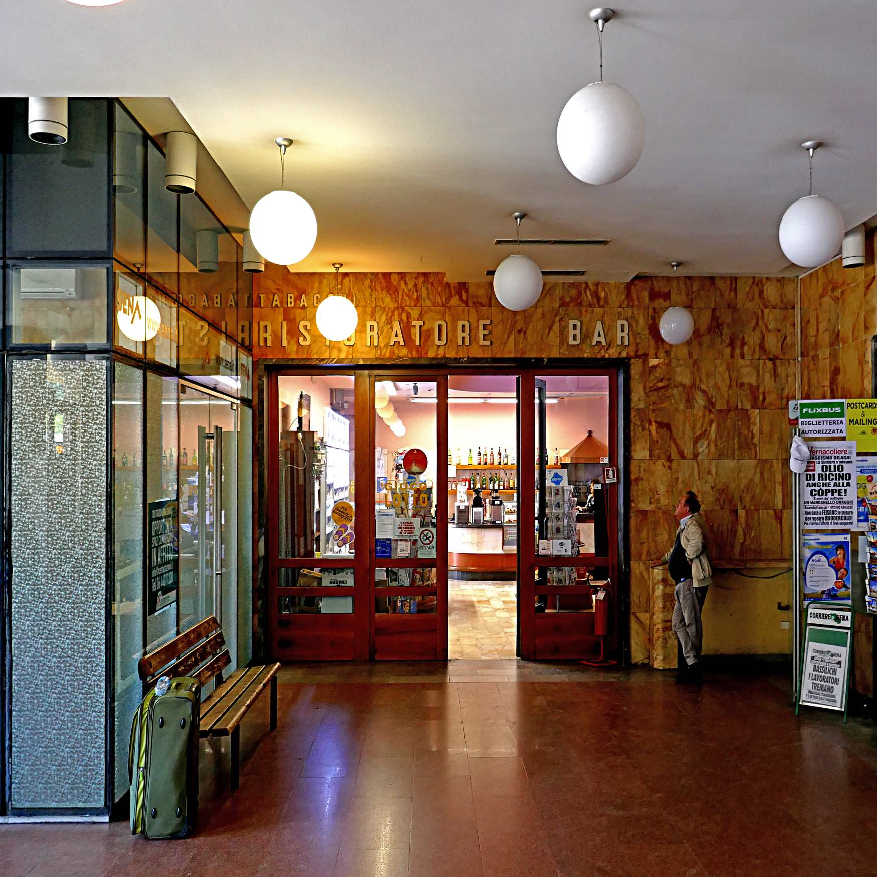 Interno della stazione di Siena